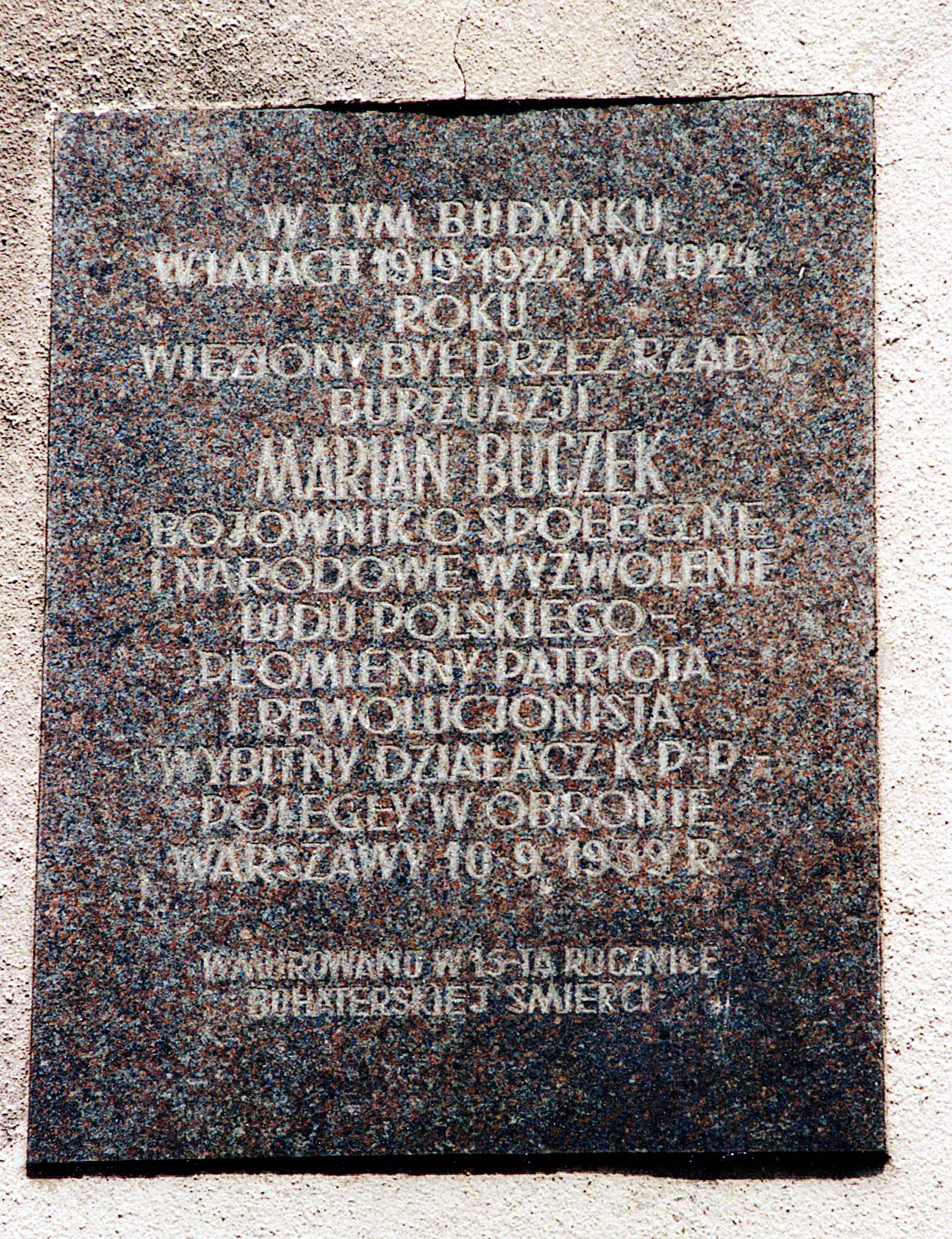 Pamiątkowa tablica, wmurowana w ścianę przedsionka Zamku Lubelskiego. Pochodzi z czasów PRL i sławi imię komunisty Mariana Buczka.